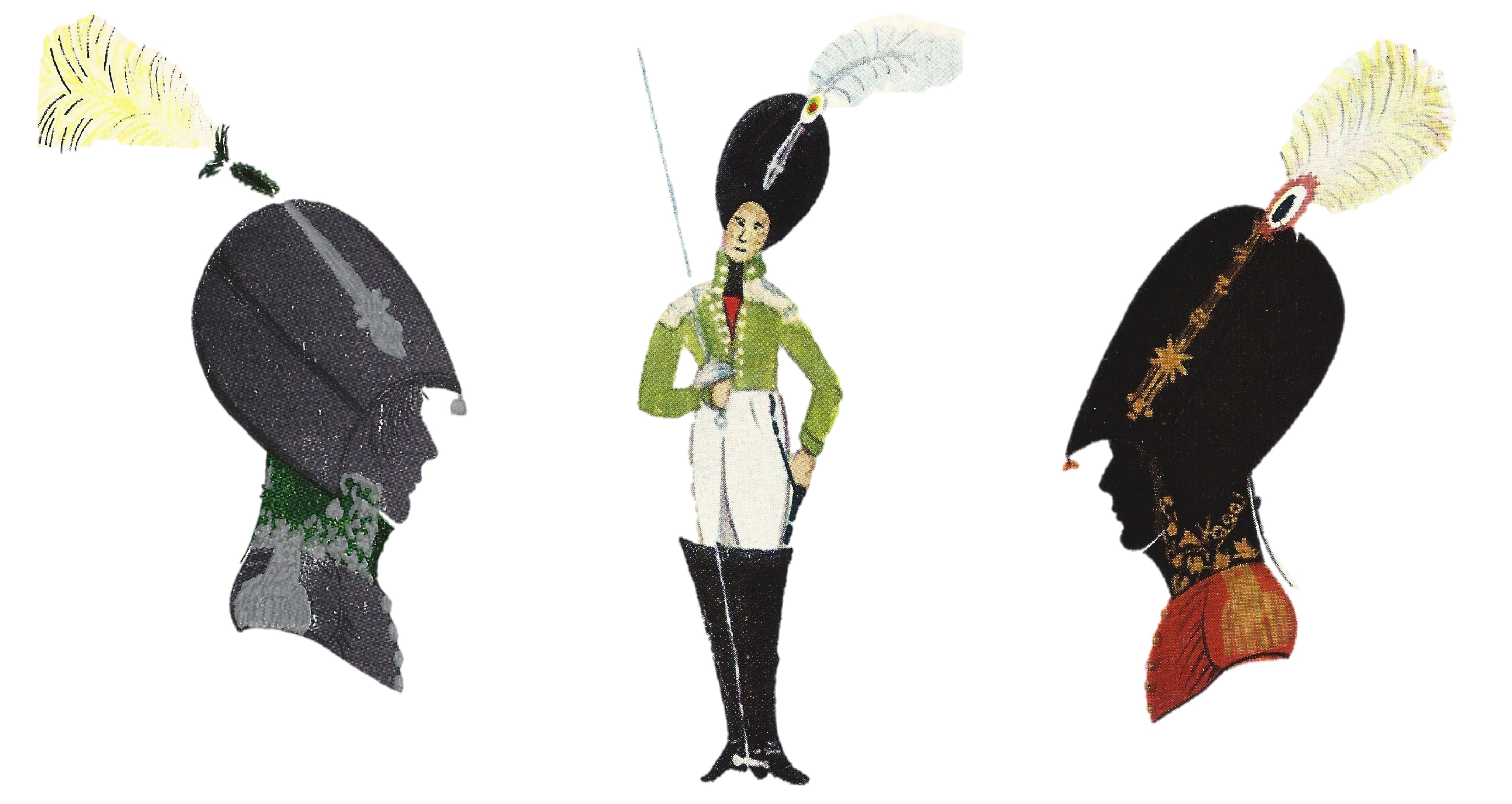 Westfälische, sächsische und schlesische Burschentracht in Halle um 1800 (von links nach rechts)